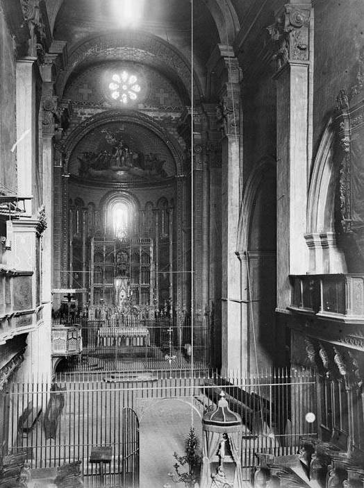 Imatge